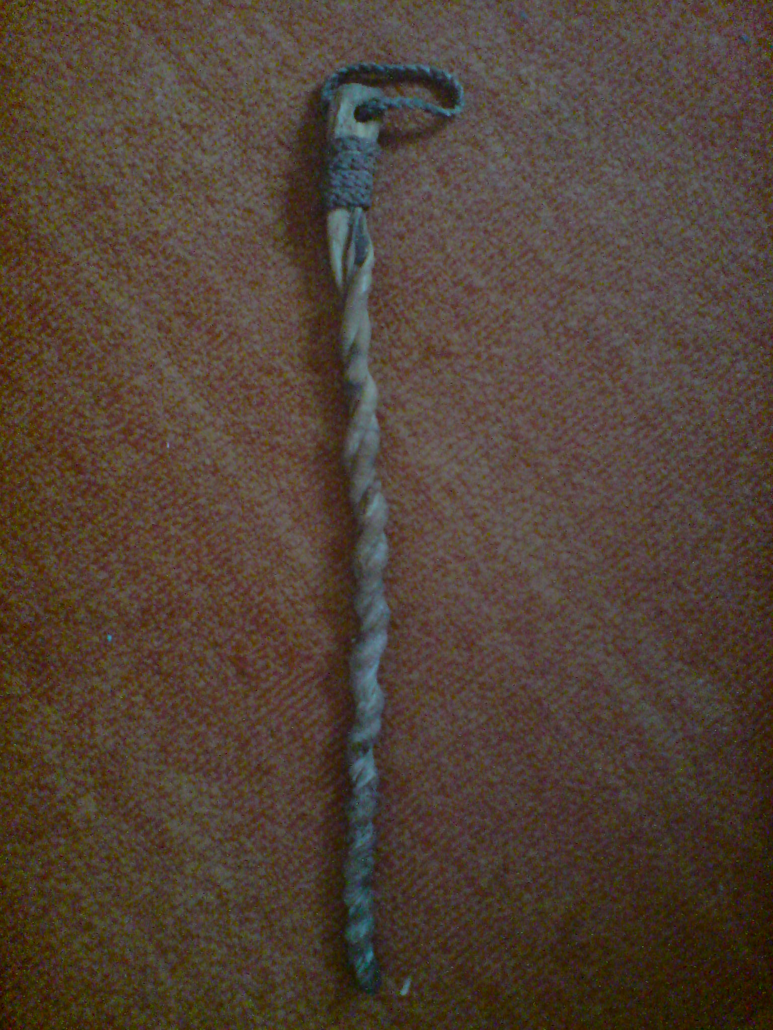 Der Parreschwanz auch Farrenschwanz oder Ochsenziemer wird aus dem Penis eines Ochsen hergestellt und dient als veraltete Schlagwaffe, ahnlich einem Gummiknüppel.